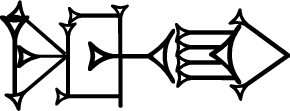 Sumer összetétel: DAM.GAR3 (NIN9.U.GAR3, MUNUS×KU.U.GAR3), akkád tamkāru